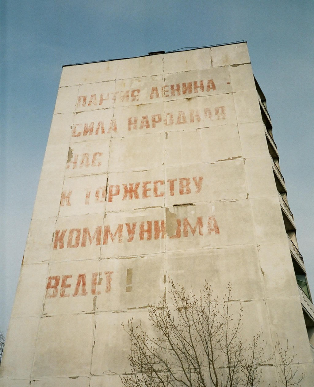 Idézet a szovjet himnuszból az egyik kilencszintes pripjatyi panelház oldalán (Ukrajna)